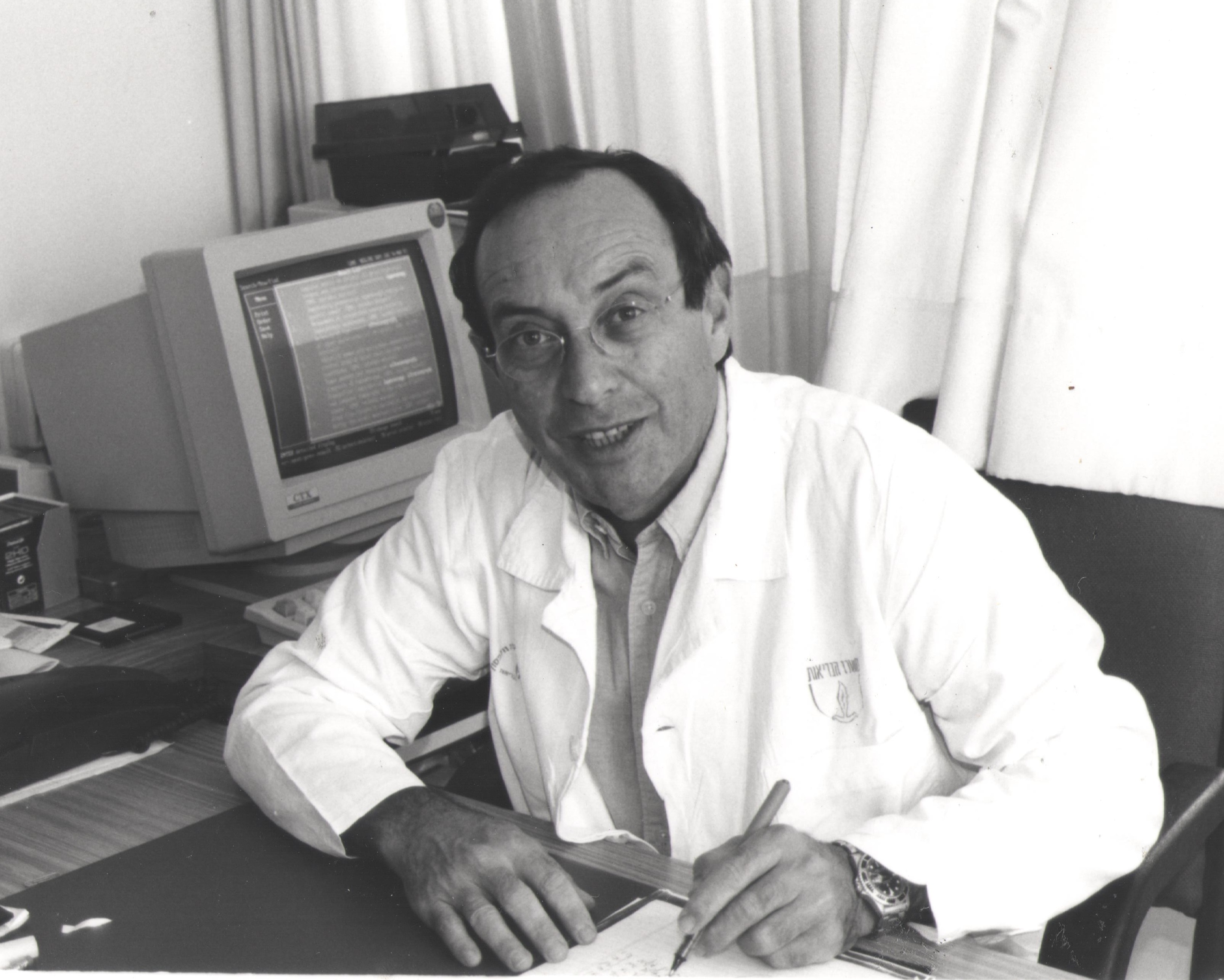 A. Czerniak in the hospital